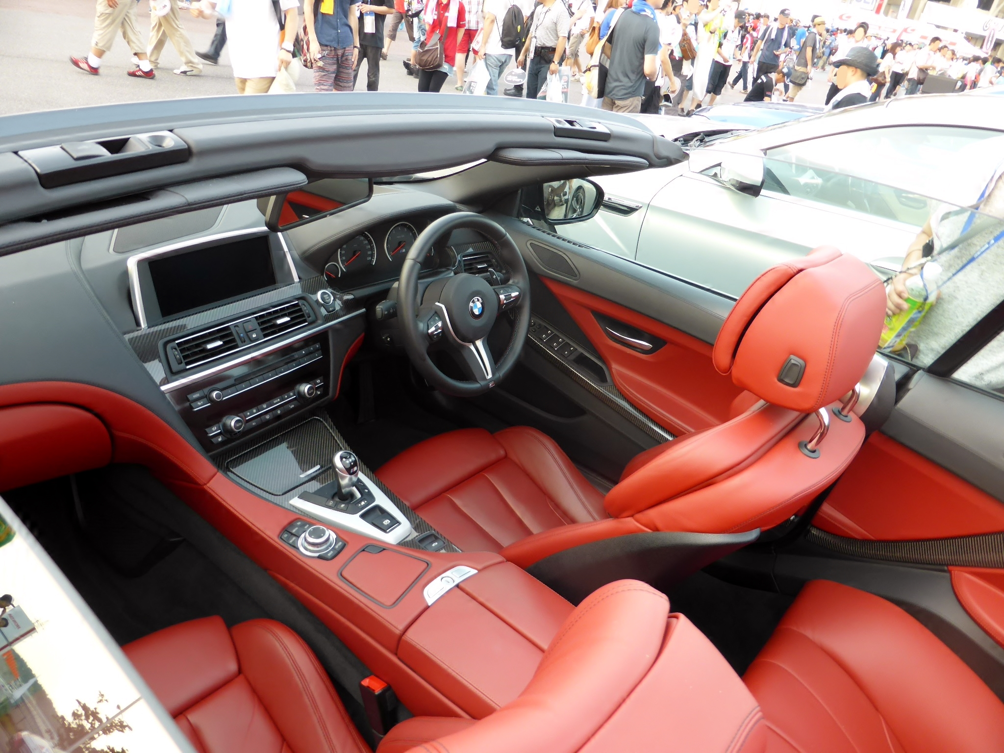 F12型BMW・M6カブリオレのインテリアを撮影。